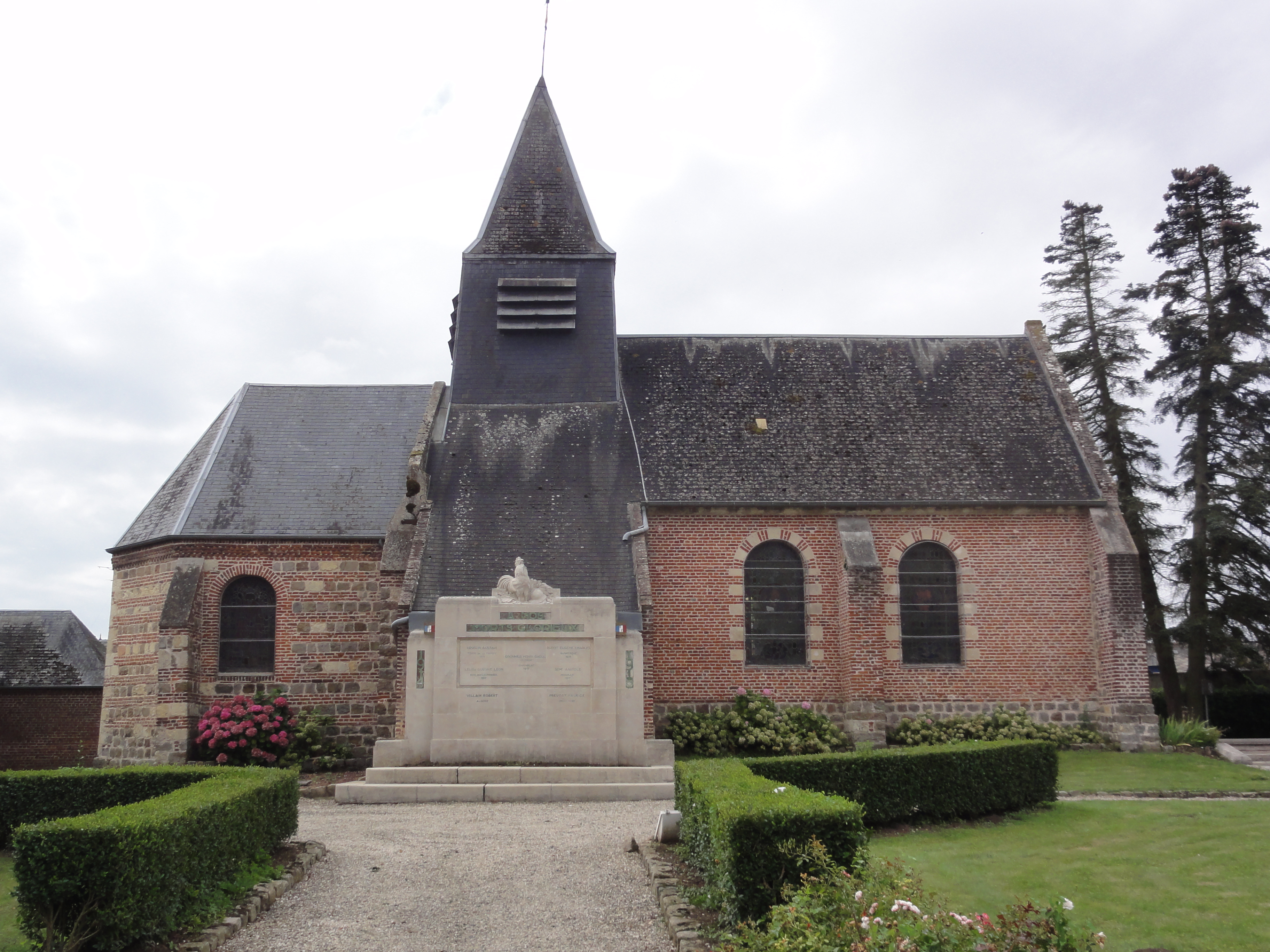 Ollezy (Aisne) église